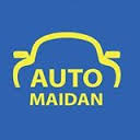 Логотип ВО "Автомайдан"